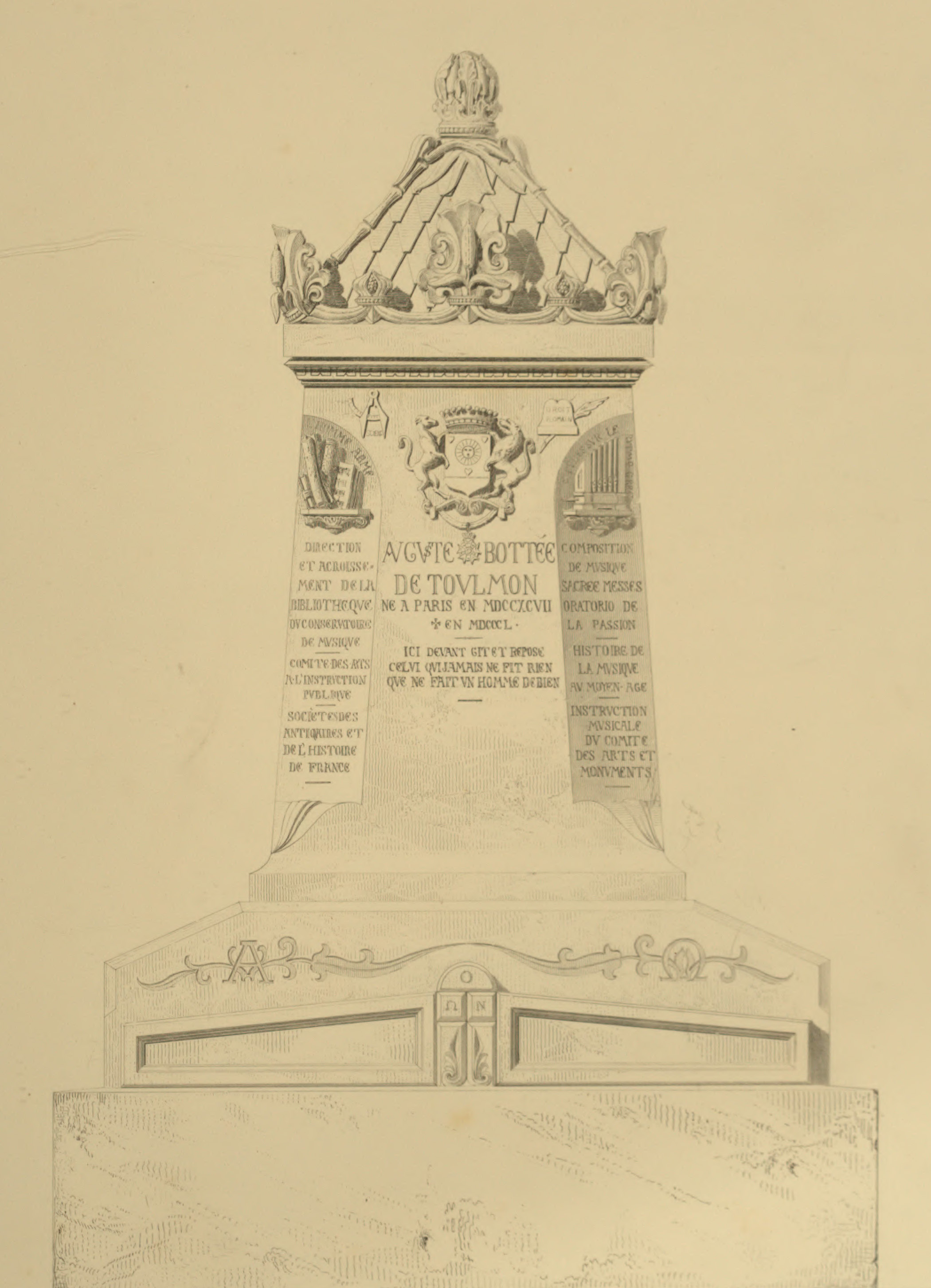 Sépulture d'Auguste Bottée de Toulmon (1764-1816), administrateur général des poudres et salpêtres ; et son fils, Auguste Bottée de Toulmon (1797-1850), musicien et musicologue. « Le caveau, en pierre meulière, sur fond de béton, est renfermé dans un terrain de quatre mètres superficiels ; il contient six cases divisées trois par trois à une cloison en pierre dure. La partie postérieure et dominante du monument se compose de trois morceaux de pierre dure de Franc-Bourg ; le premier forme tout le soubassement ; le second, la partie moyenne, qui contient les inscriptions ; le troisième, le chapeau, la corniche ornée comprise. Le châssis du devant et les deux dalles tumulaires sont en même pierre que le tombeau. La croix du caveau, les ornements du socle et de la corniche sont gravés en creux et coloriés en rouge de brique, l'alpha et l'oméga en bleu. Les inscriptions sont d'un ton brun pâle, comme les lettres d'un vieux manuscrit. L'ensemble de la dépense s'est élevée à 3000 francs. » (Lenoir, 1853).